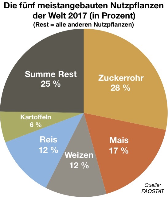 Das Verhältnis der Erntemengen der fünf meistangebauten Nutzpflanzen 2017 zueinander (in Prozent)